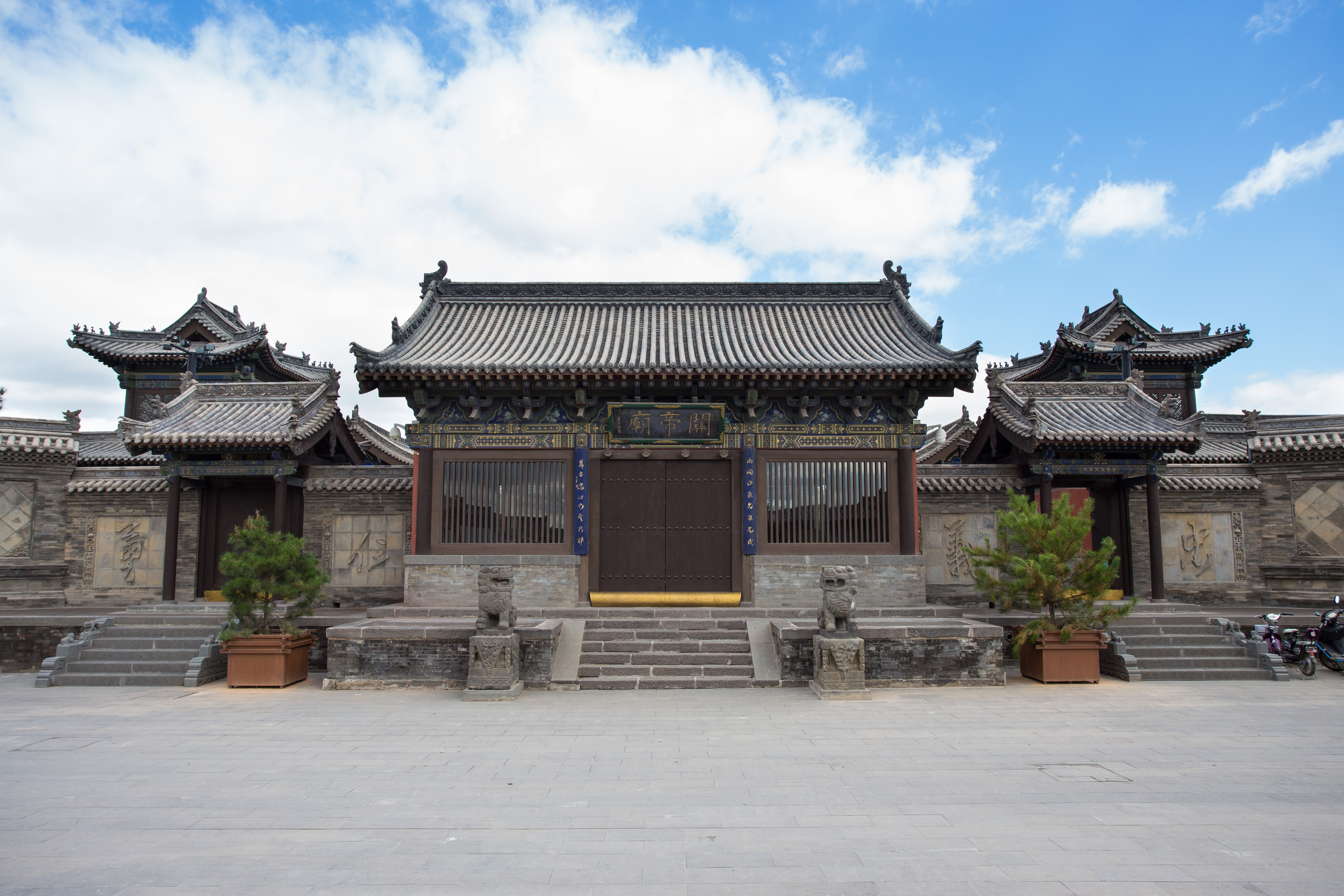 大同关帝庙—— 山门